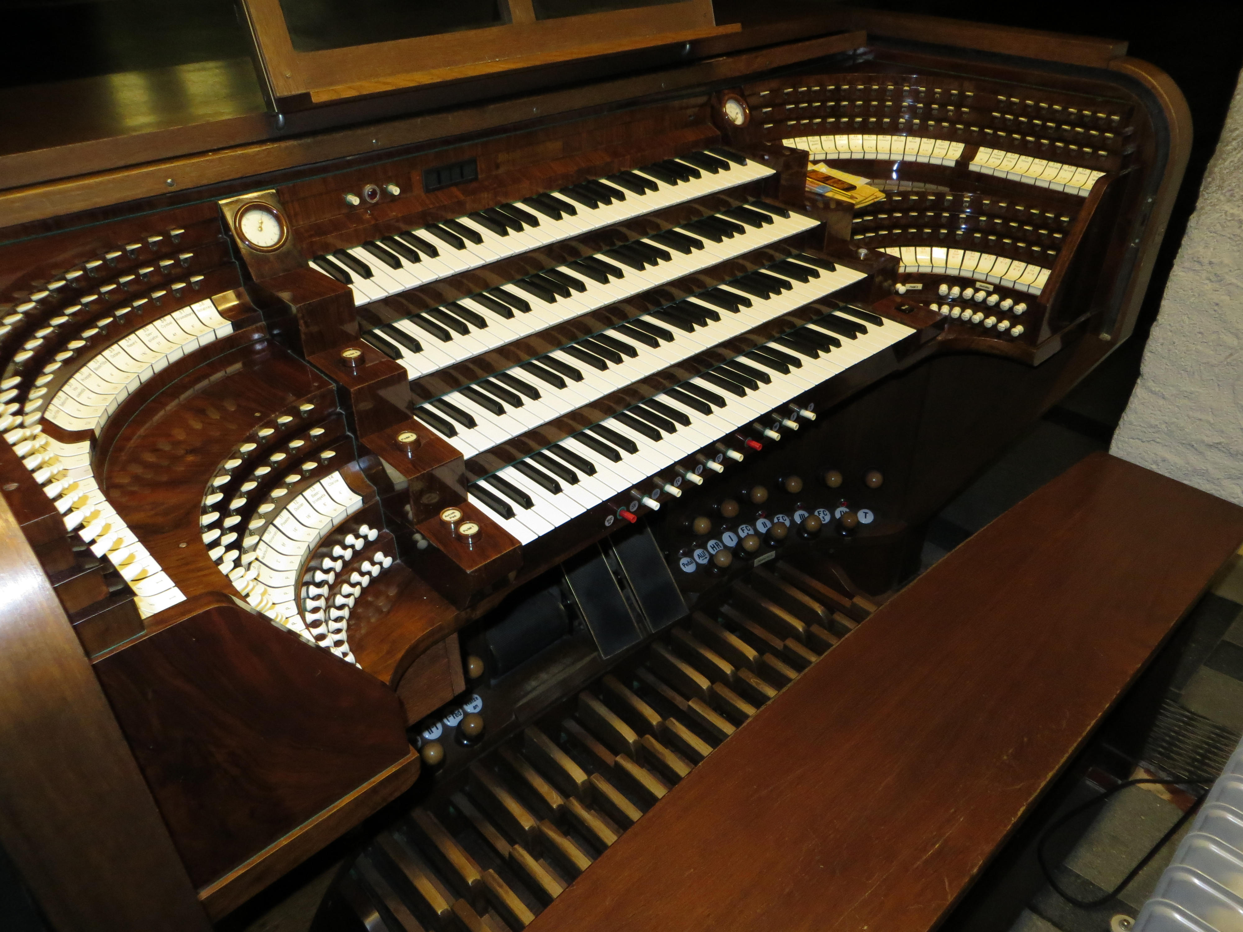 Spieltisch der Klais-Orgel der Abteikirche Münsterschwarzach